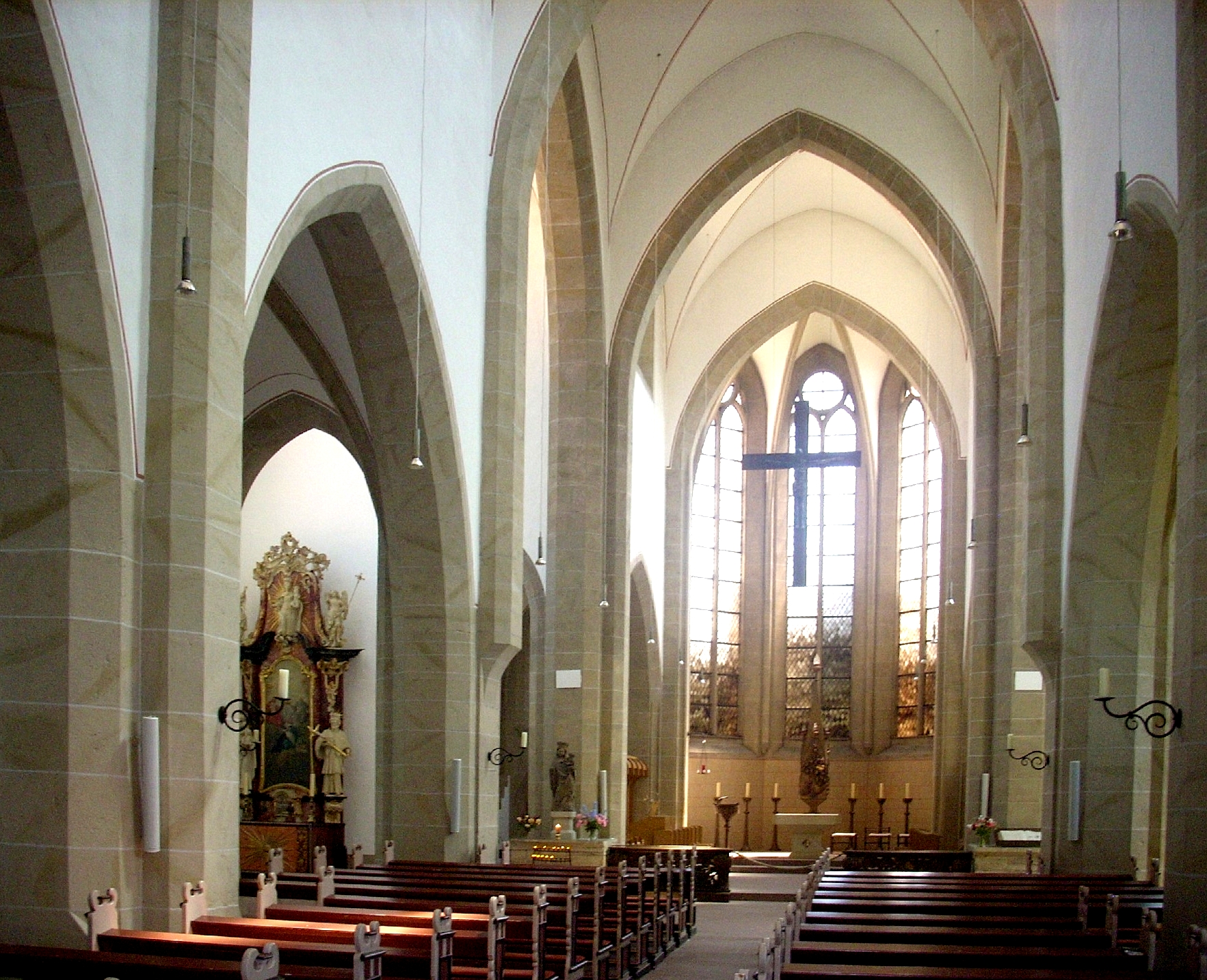 Kloster Marienrode, Klosterkirche St. Michael, Inneres